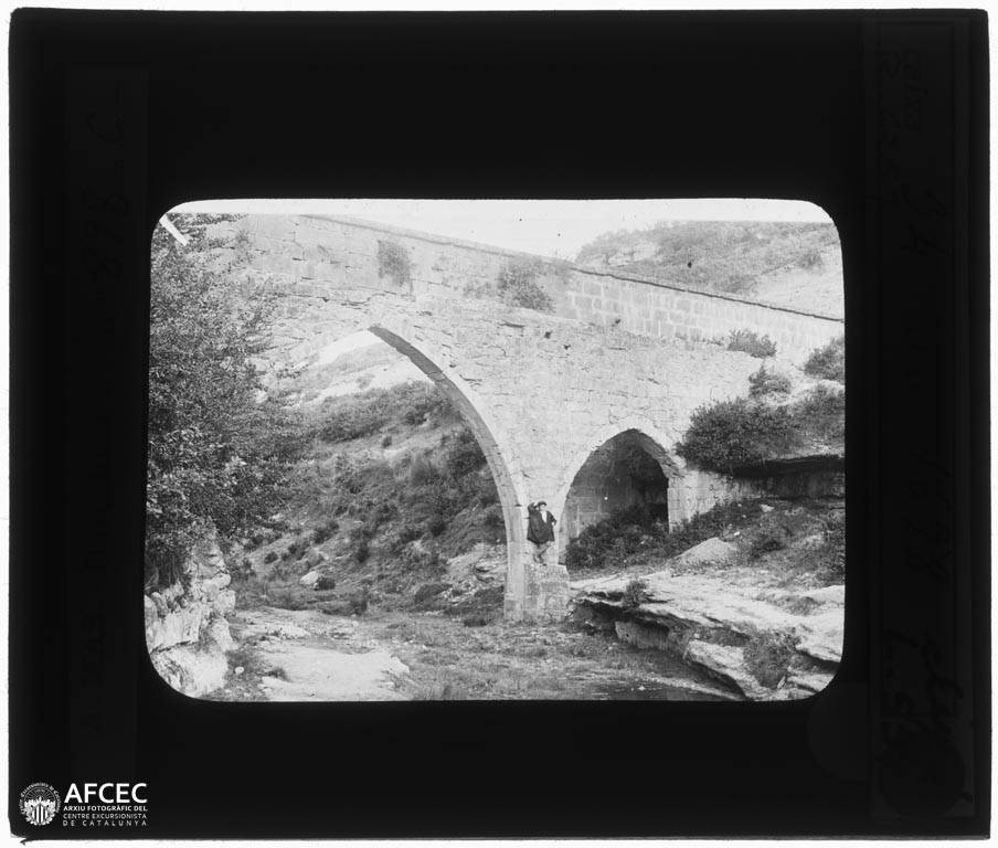 Imatge